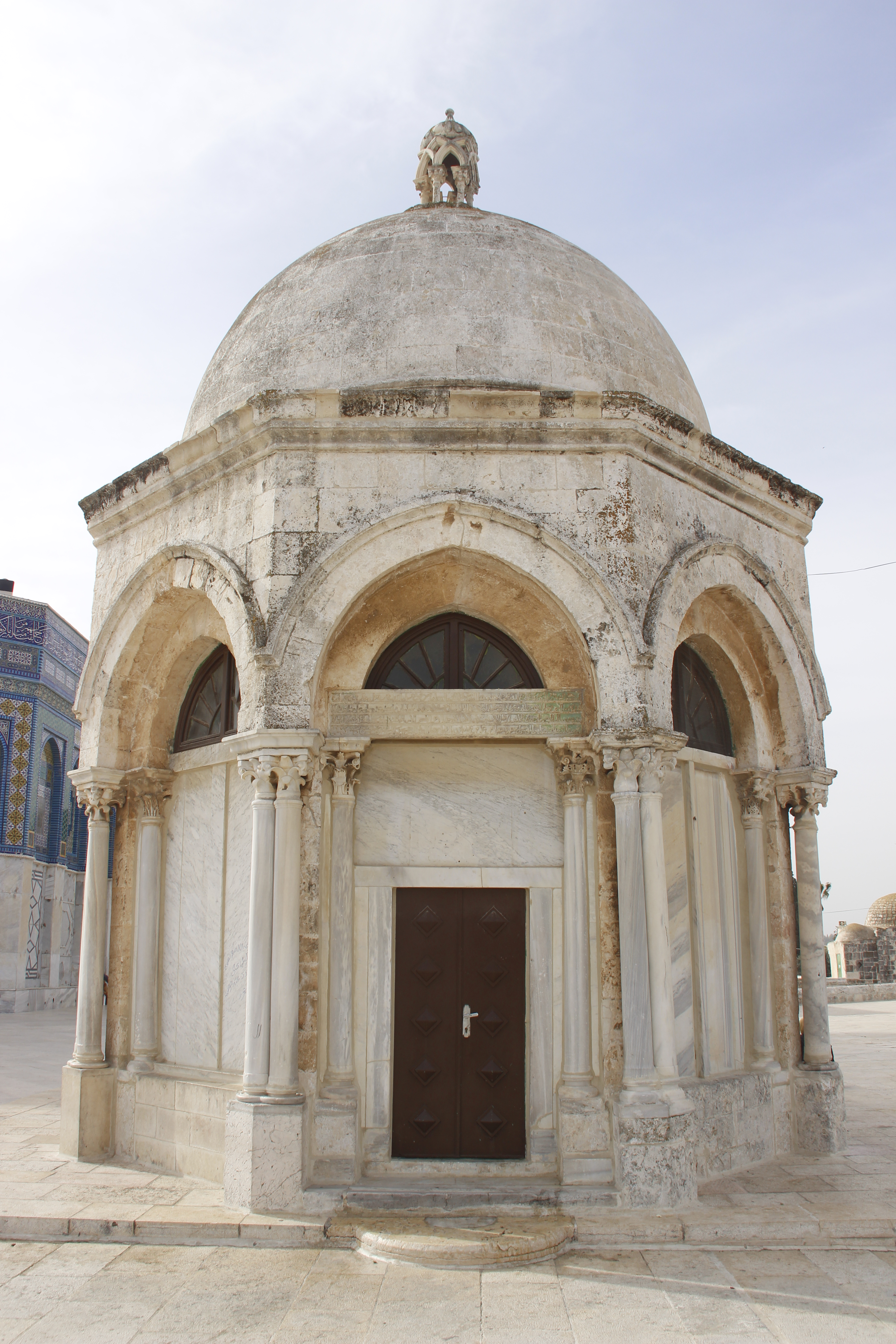 قبة المعراج في المسجد الأقصى